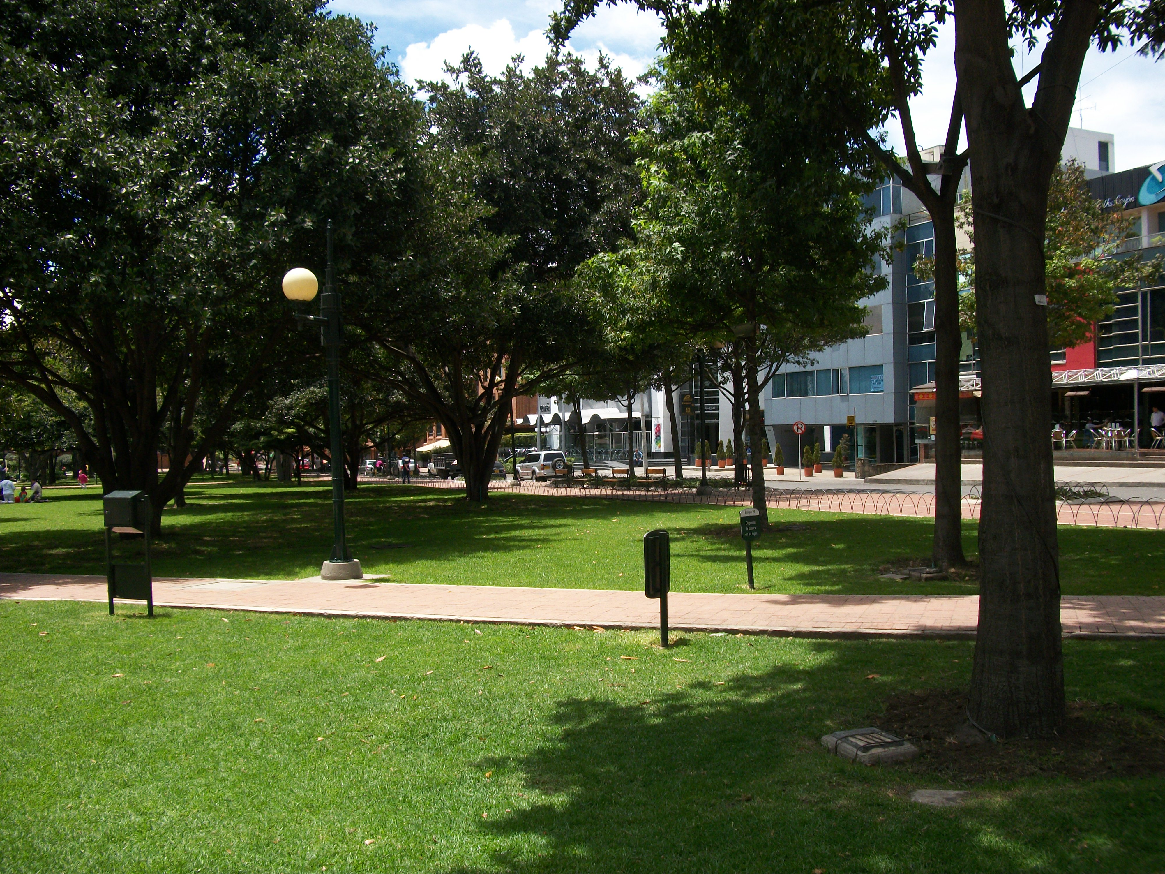 Costado nororiental del parque de la 93, Bogotá (Colombia).